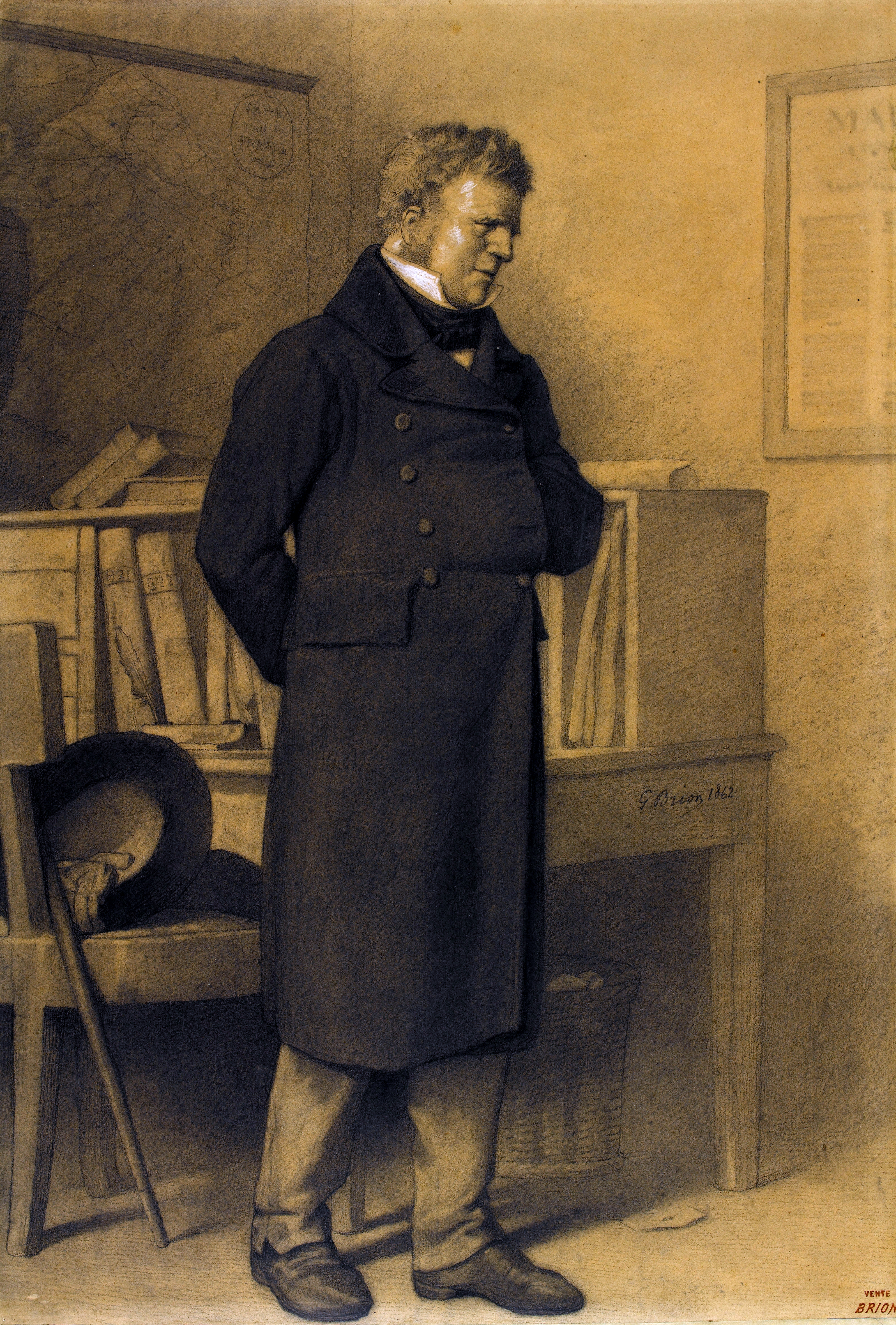 Monsieur Madeleine, illustration de Gustave Brion pour Les Misérables (Maison de Victor Hugo - Hauteville House).